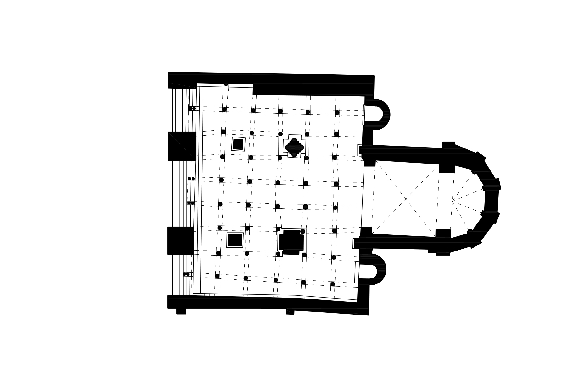 Pianta della cripta della basilica di San Zeno